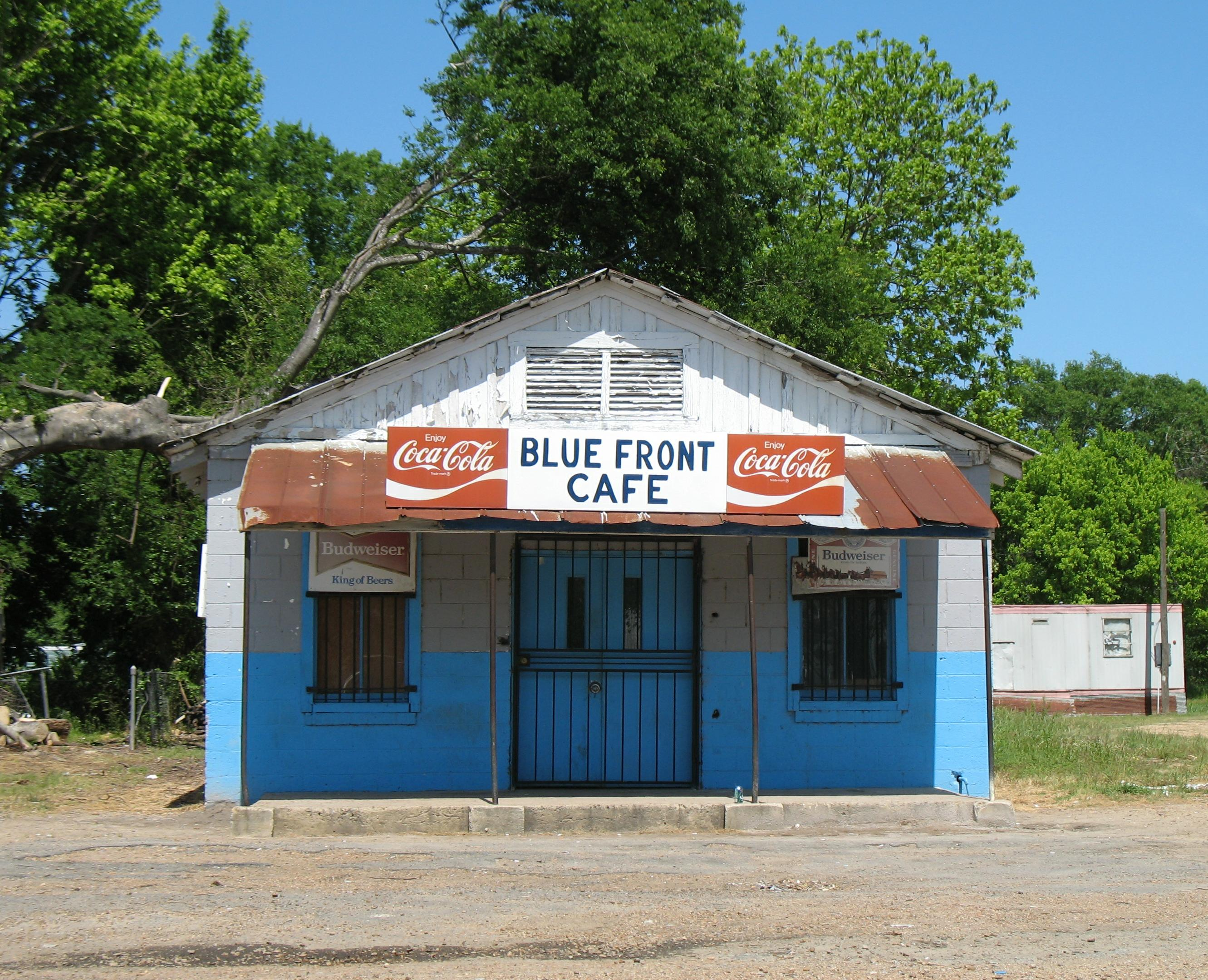 A juke joint in Bentonia, Mississippi.